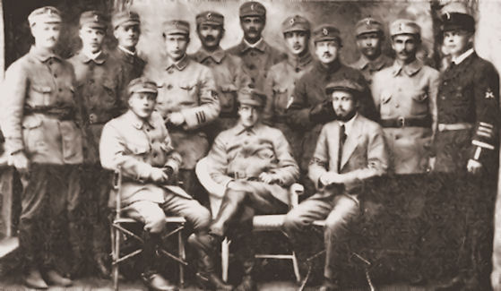 Karjala 2. rykmentin XI pataljoona